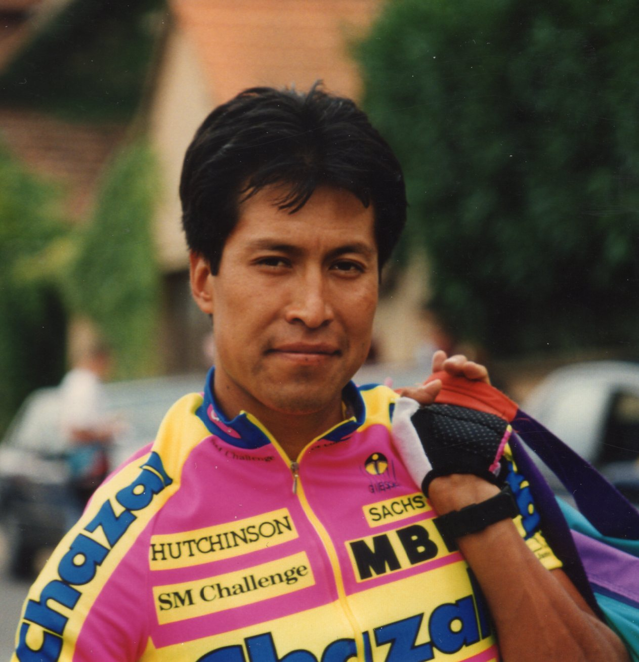 Critérium de Lèves 1995